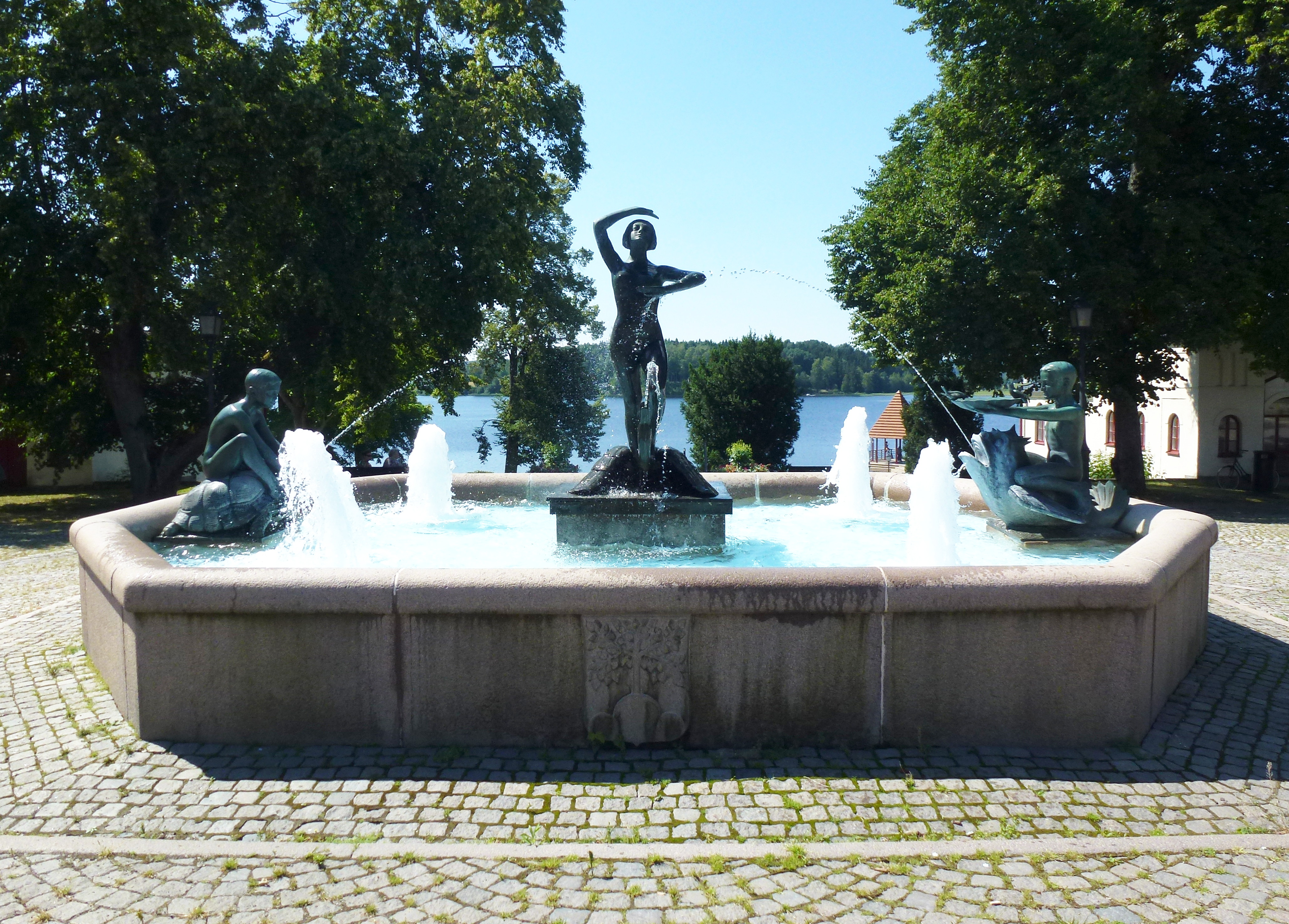 Lindesberg, fontänen Leda och Svanen, Adolf Jonsson